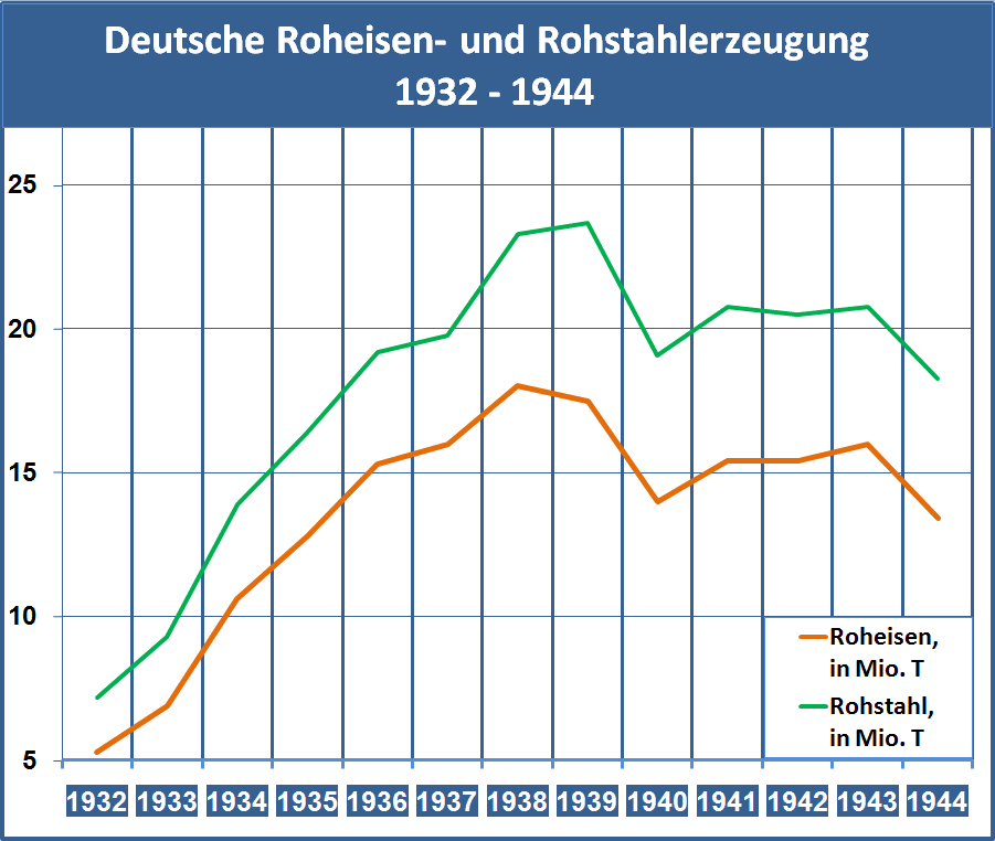 Grafik, Deutsche Roheisen- und Rohstahlerzeugung, 1932–1944